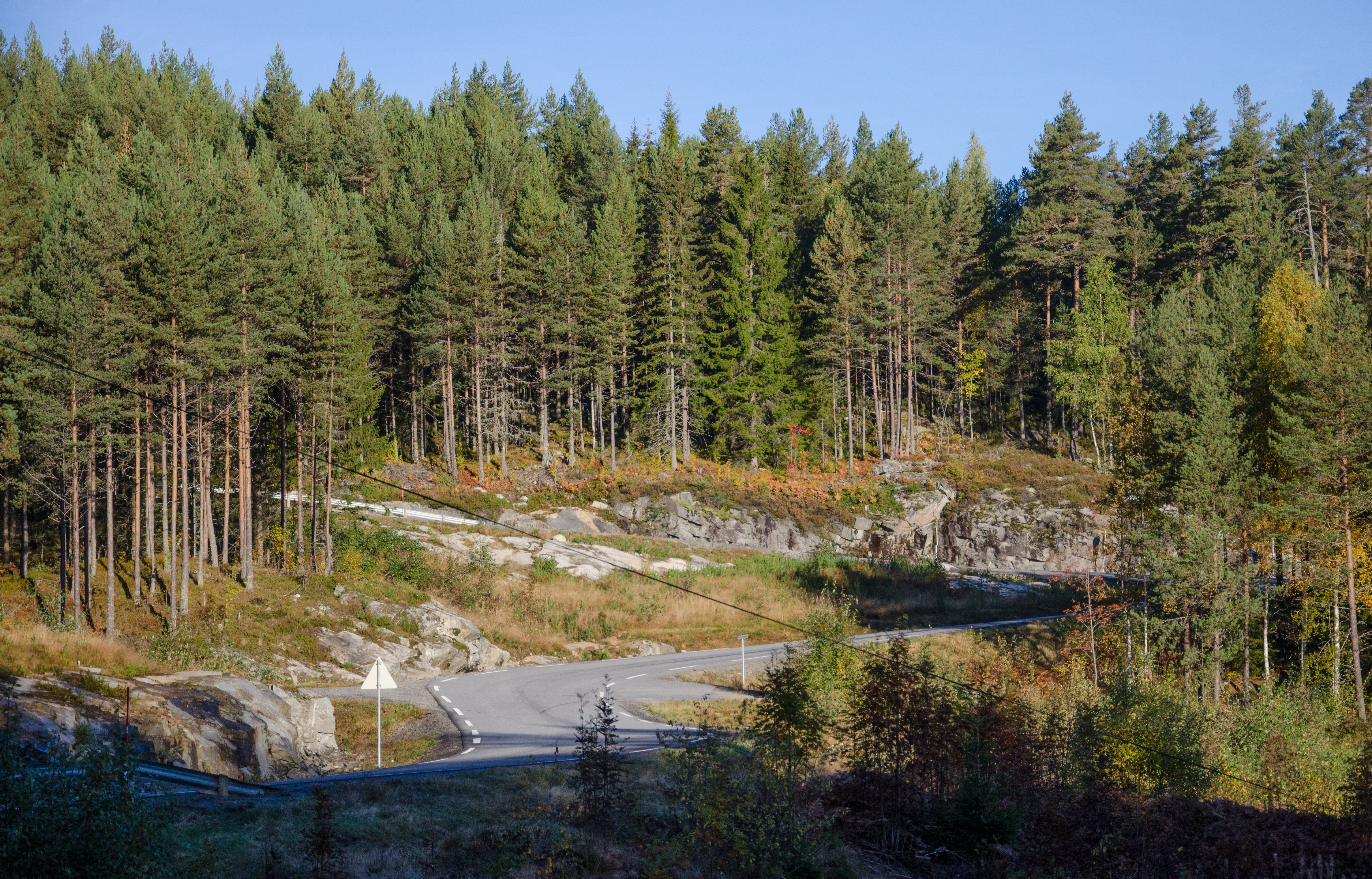 Fylkesvei 152 Reshjemvegen